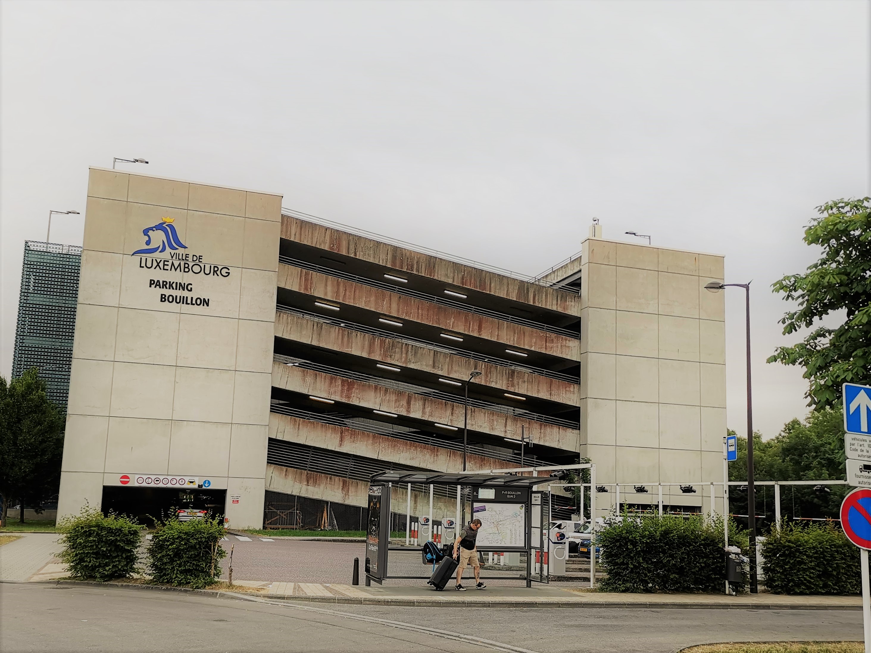 Luxembourg, parking en ouvrage P+R Bouillon.